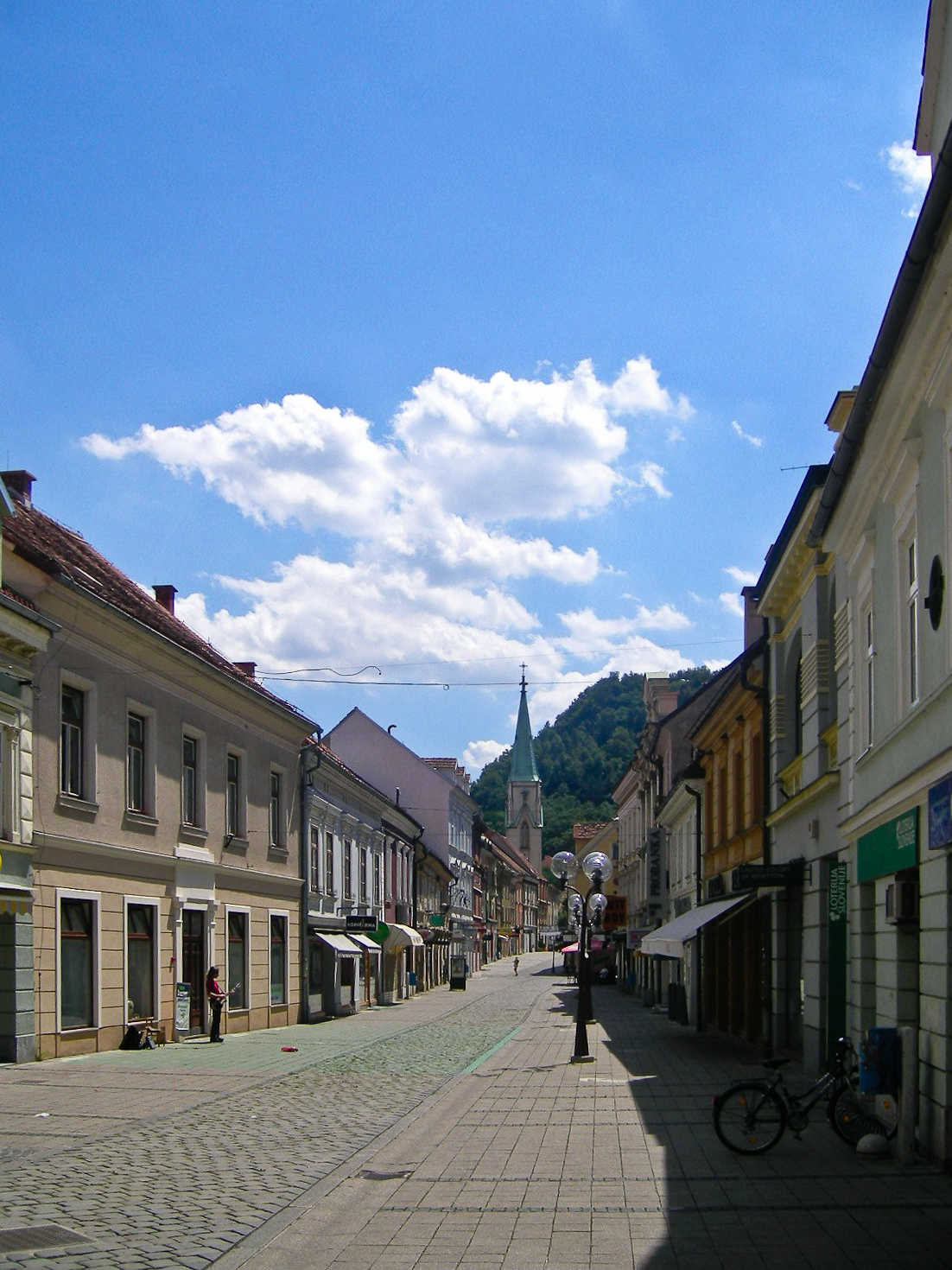 Celje - Stanetova ulica